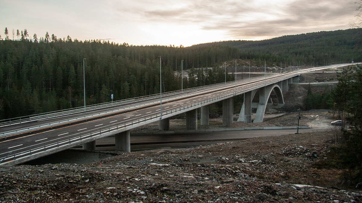 Saggrenda bru, sett fra nord.